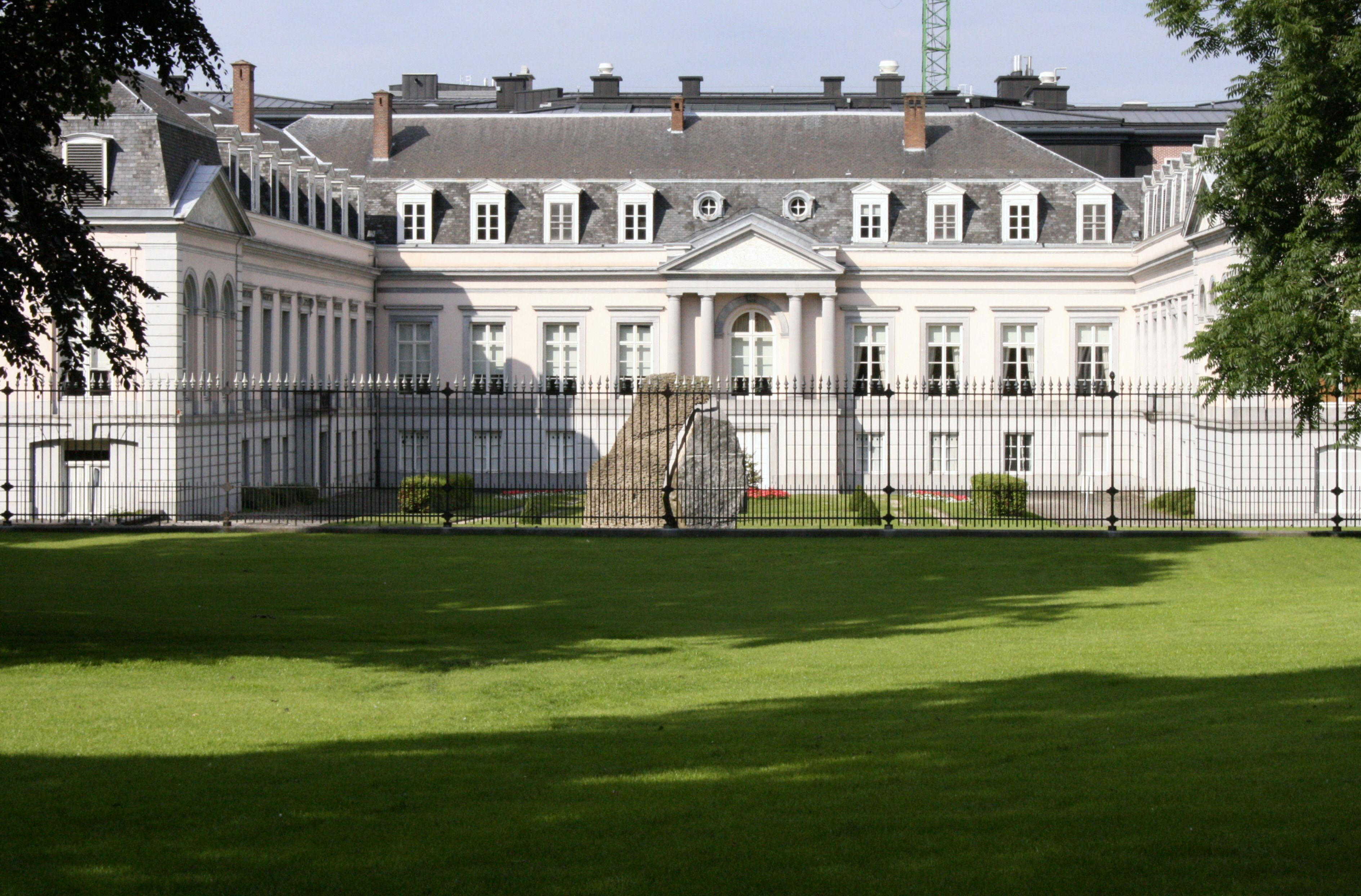 Parc d'Egmont, Bruxelles (Belgique). Vue du Palais d'Egmont depuis le parc